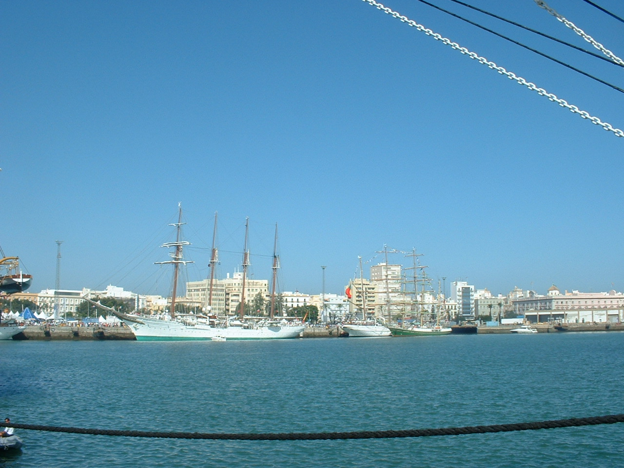 El buque escuela español en Cádiz. 27 de Julio de 2006. Concentración para la regata del 50 aniversario de la Tall Ship Race.